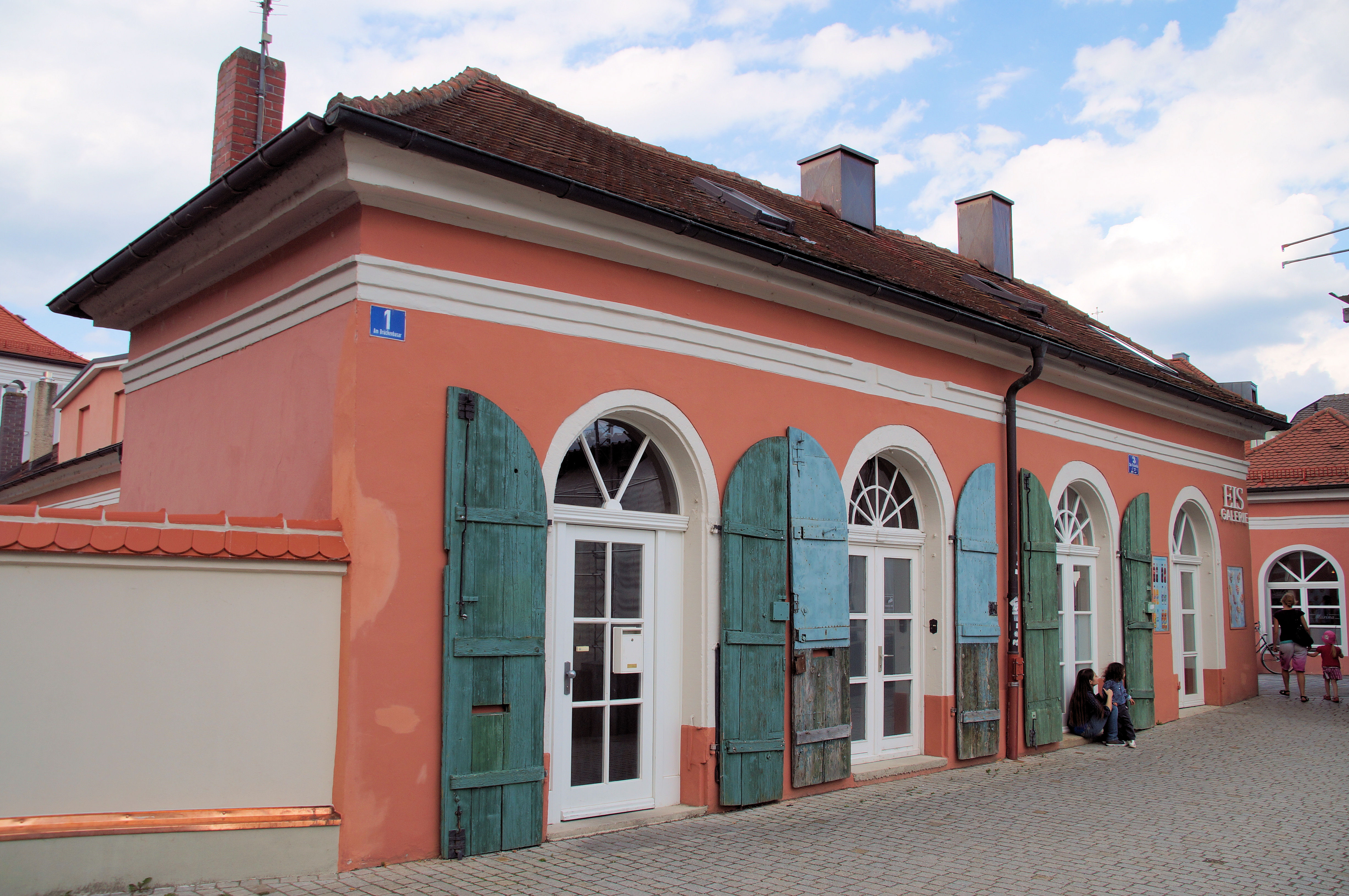 Sogenannter Brückenbasar, zwei symmetrische und eingeschossige Ladenzeilen mit Walmdach über hakenförmigem Grundriss, klassizistisch, 1824/25 anstelle der 1809 zerstörten mittelalterlichen Anlage